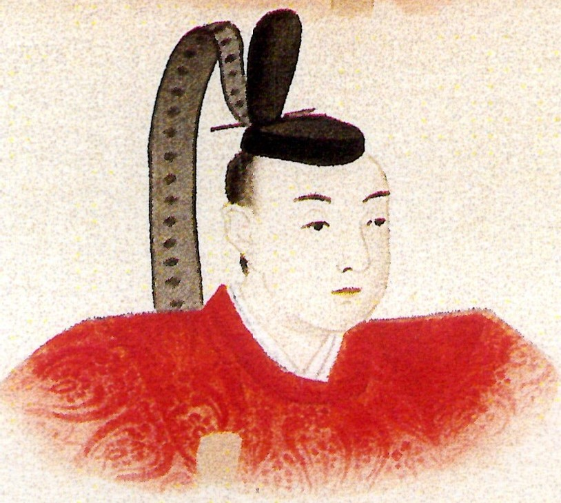 板倉重治の肖像。